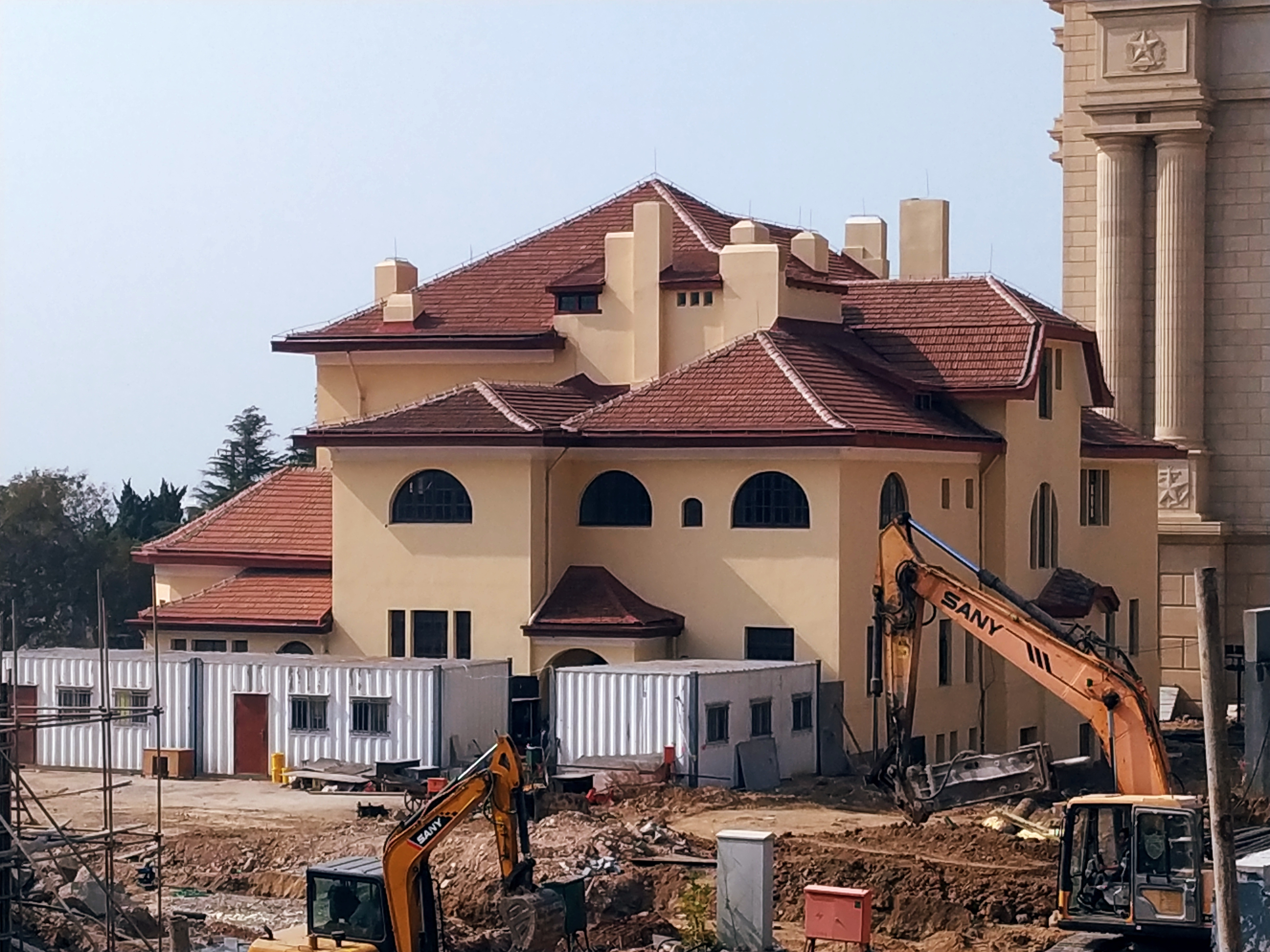 中文（中国大陆）: 德国海军军官俱乐部旧址